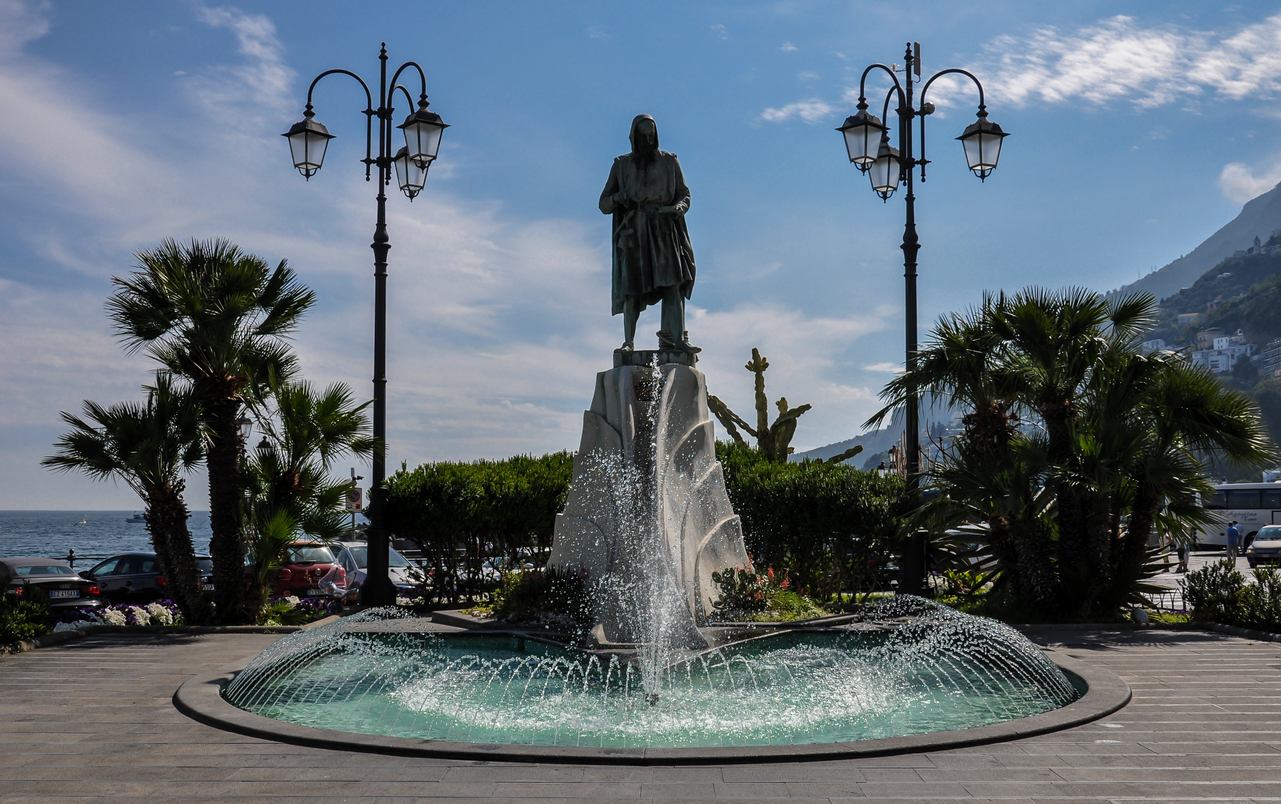 Piazza Flavio Gioia - Amalfi